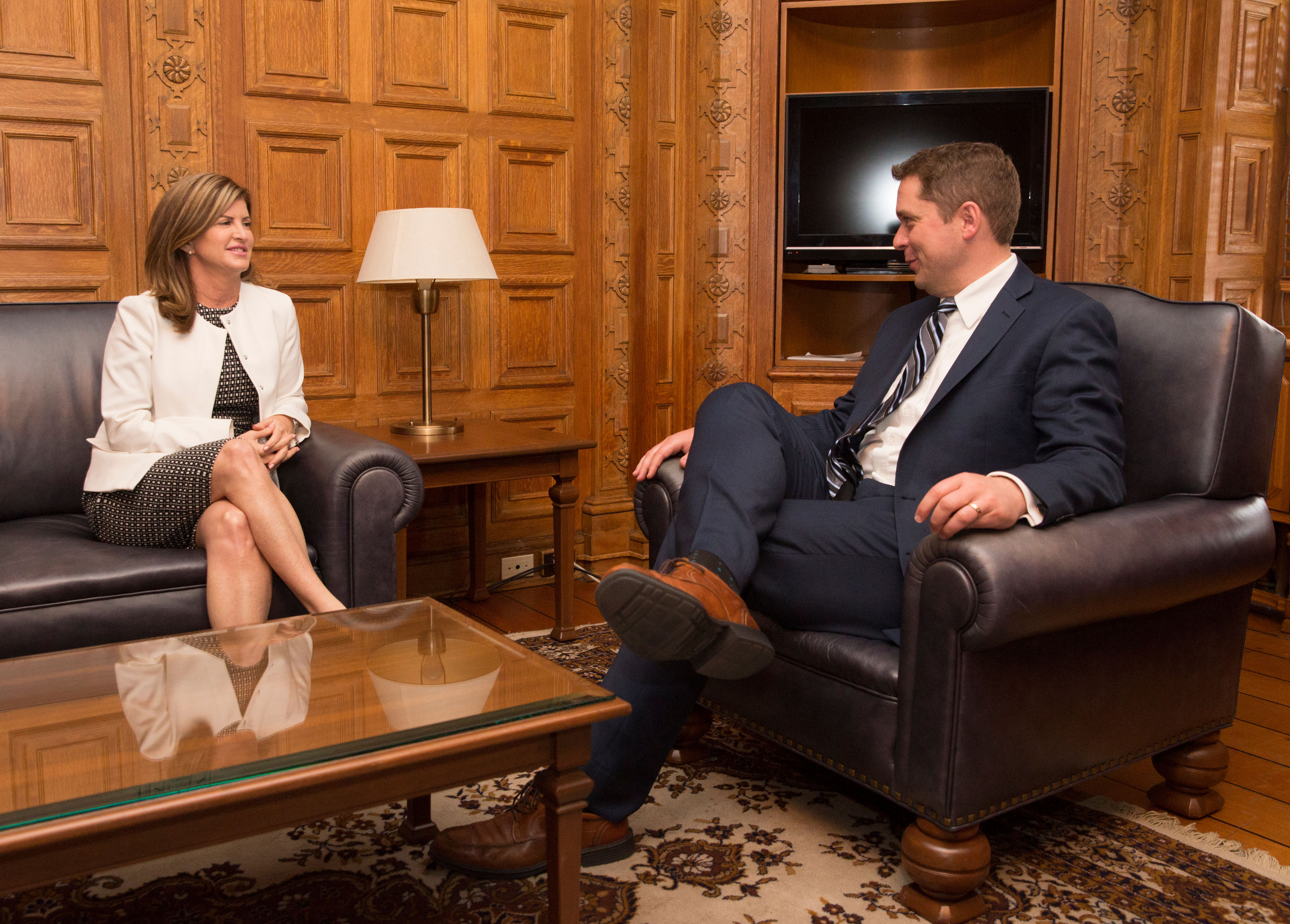 Sat down with Rona Ambrose this afternoon. Thank you for your service to Canadians and personal guidance, Rona! Cet après-midi, je me suis assis avec Rona Ambrose. Merci, Rona, pour votre service aux Canadiens et vos conseils personnels!